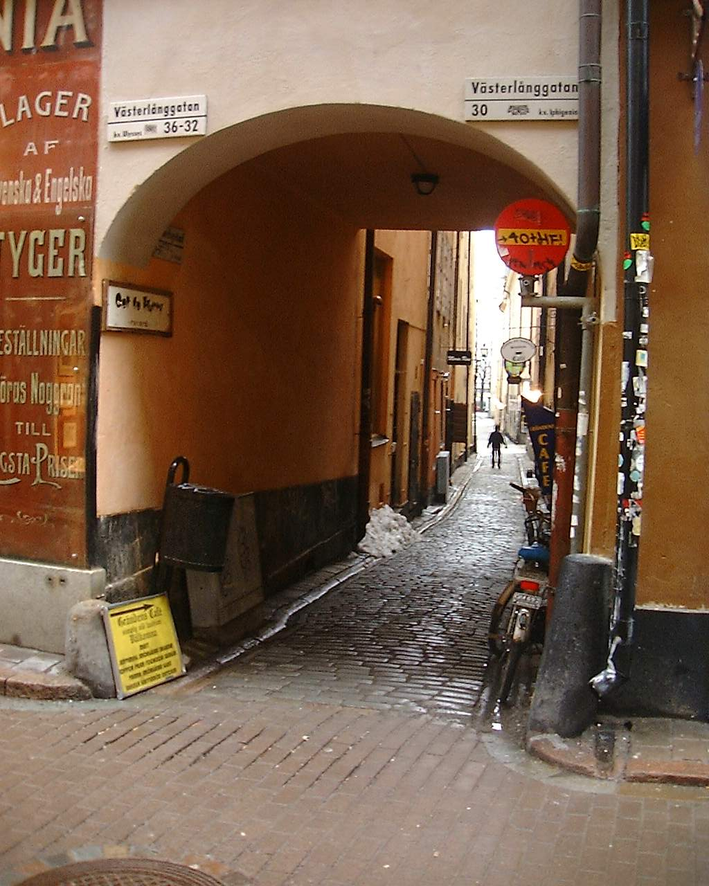 Yxsmedsgränd, Gamla stan, Stockholm